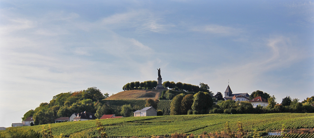 Châtillon depuis la route, en contrebas.